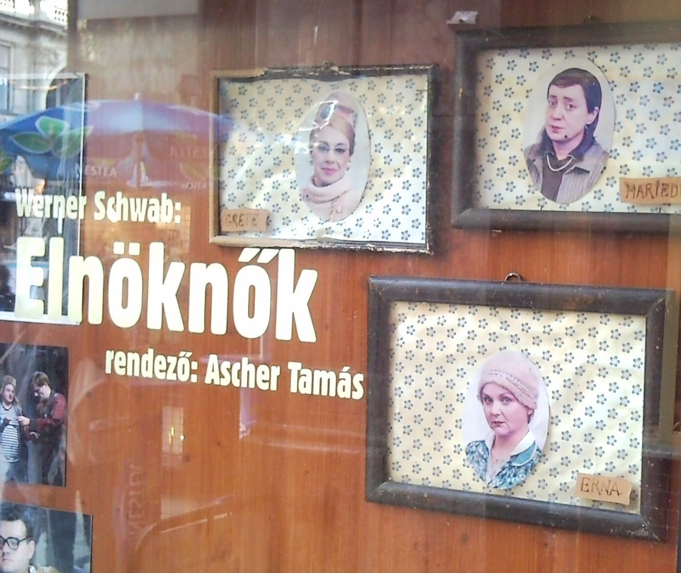 Budapesti Katona József Színház – Kamra: Elnöknők